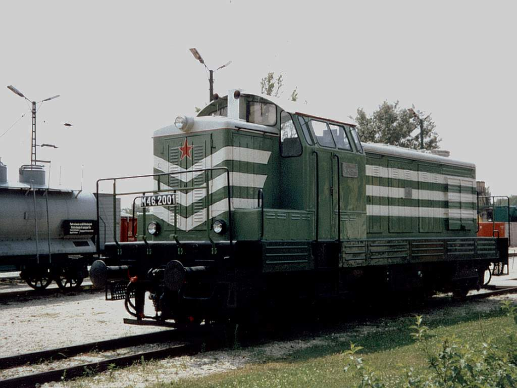 A MÁV M46 sorozatú dízel-hidraulikus mozdonya.